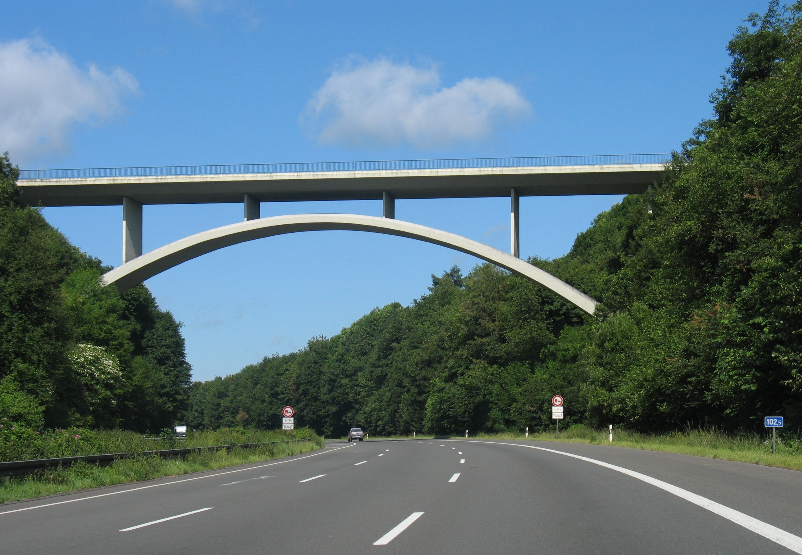 Bogenbrücke über die A 4 bei Kottenforst.